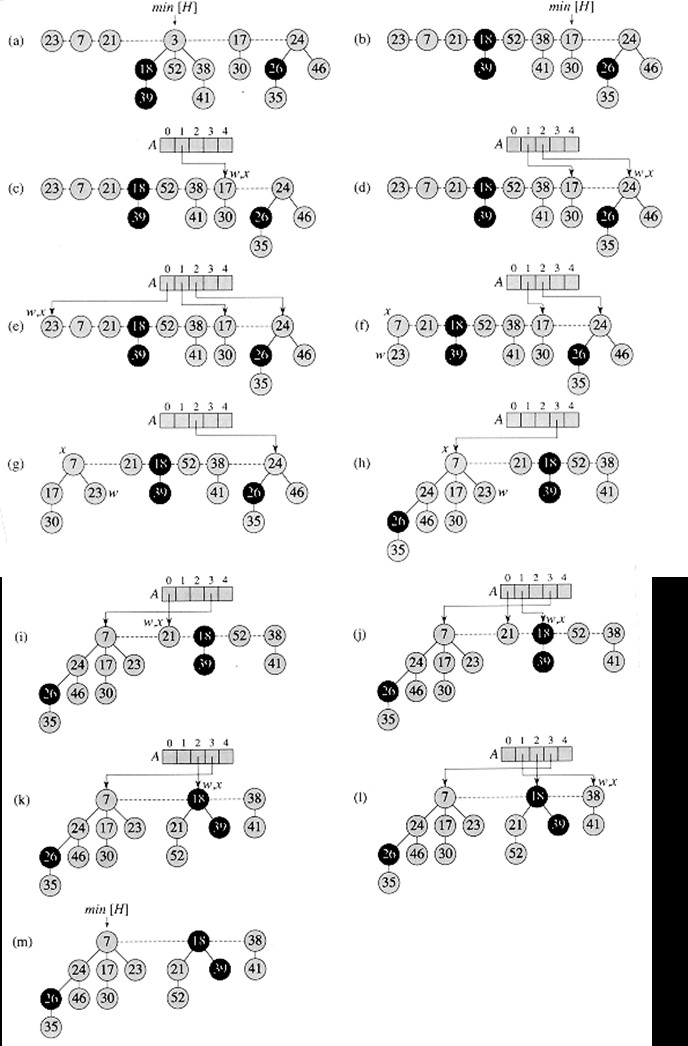 한국어 (조선): 피보나치 수열3